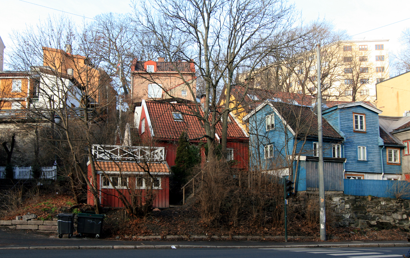 Bergfjerdingen, Oslo. Seen from Fredensborgveien.